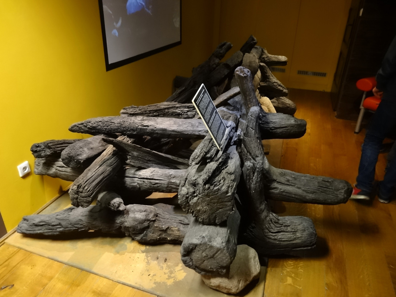 Wnętrze Białego Spichrza w Bydgoszczy. Wystawa "W grodzie Bydgosta. Tajemnice życia wczesnośredniowiecznych mieszkańców Bydgoszczy i okolic". Fragment wału obronnego otaczającego bydgoski kompleks grodowy od strony północno-wschodniej odkryty w 2007 roku, datowany na ok. 1040 rok.